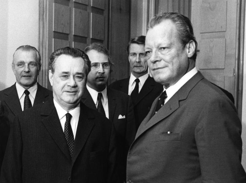 5.7.1972 Bundeskanzler Willy Brandt empfängt den sowjetischen Außenhandelsminister Nikolai Semjonowitsch Patolitschew in Bonn